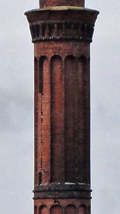 Schoorsteen (detail) van de oude steenbakkerij van Oostrum